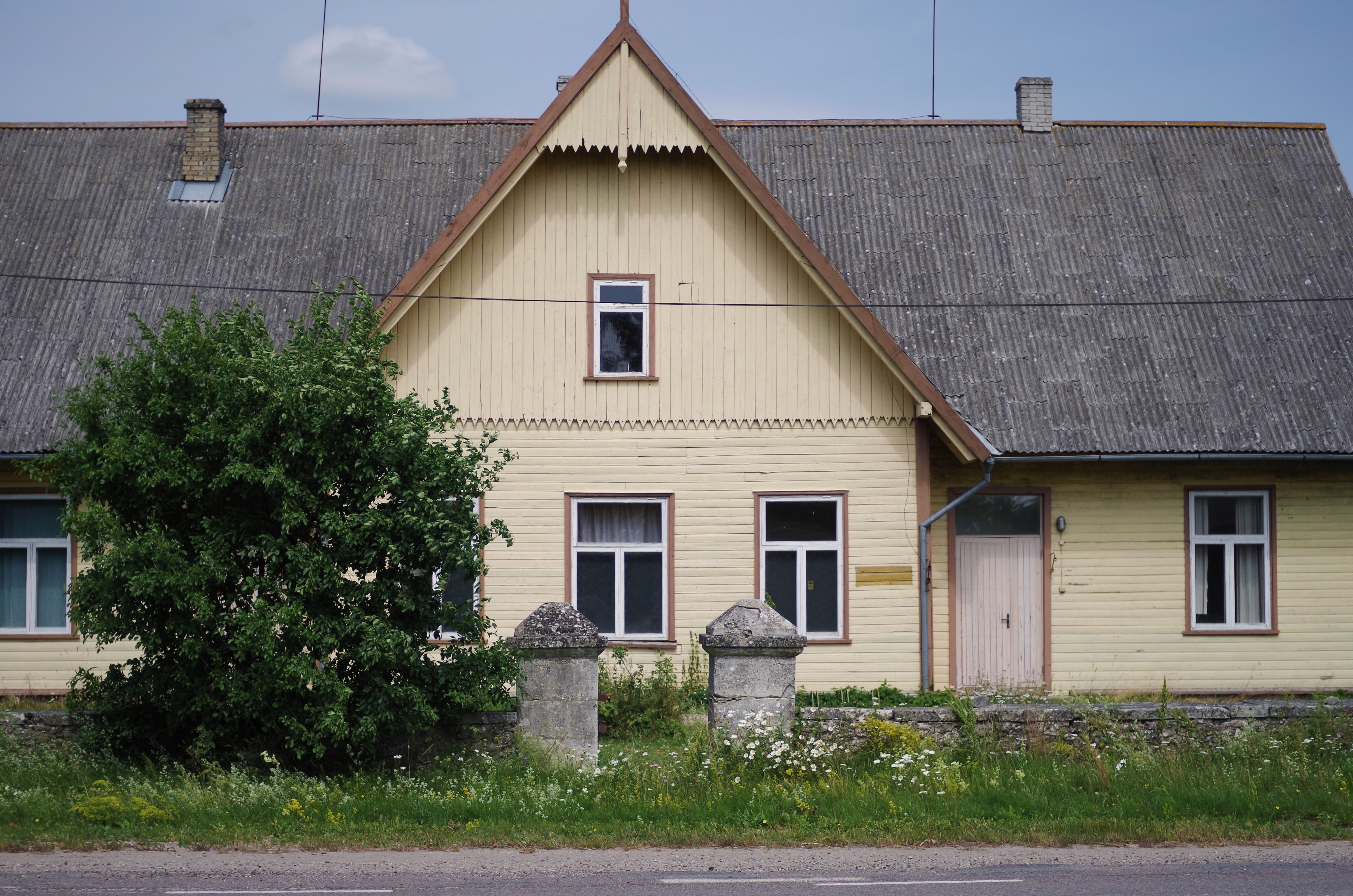 Pihtla raamatukogu endine hoone Pihtla vallas Saaremaal. (2014)